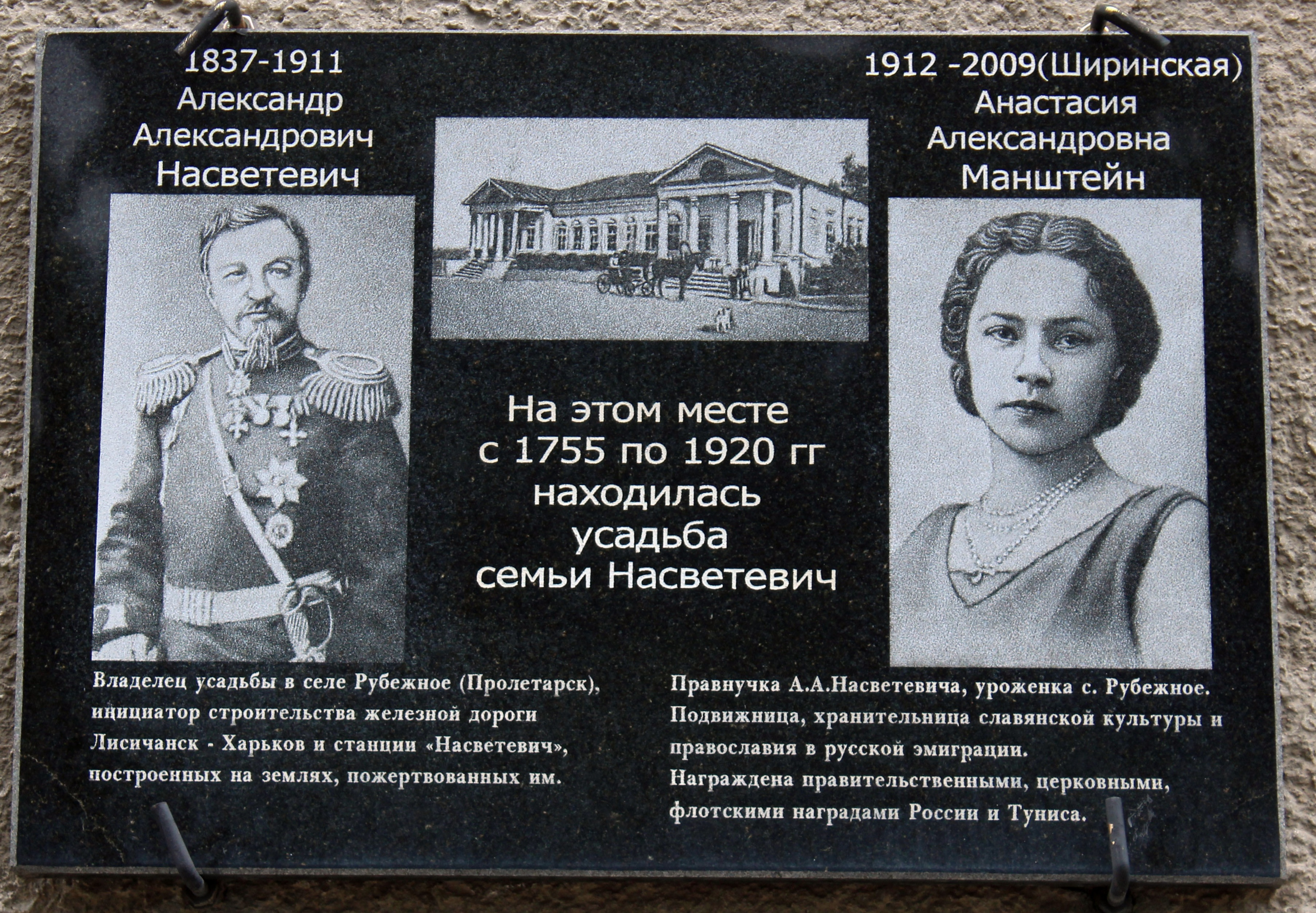 Меморіальна дошка Олександру Насвітевичу і його правнучці Анастасії Манштейн-Ширинській на будівлі школи 5 Пролетарська (м.Лисичанськ)